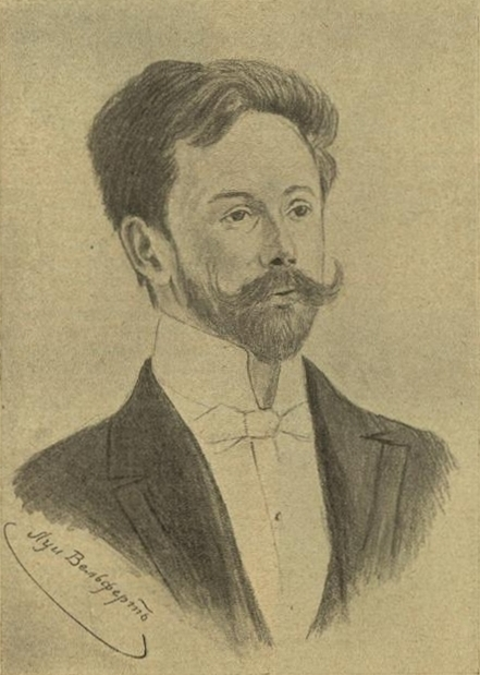 Александр Скрябин